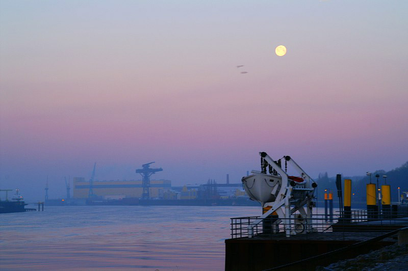 Blick vom Schulschiff Deutschland über die Mündung der Lesum in die Weser bei Bremen-Vegesack mit der ehemaligen Werft „Bremer Vulkan“ im Hintergrund und einem Rettungsboot des Schulschiffes im Vordergrund Google English translation: View from the training ship of Germany on the mouth of the Weser Lesum at Bremen-Vegesack with the former shipyard Bremer Vulkan "in the background and a rescue boat training ship in the foreground. Slightly modified for clarity: View from the training ship Deutschland across the Weser-Lesum estuary at Bremen-Vegesack with the former Bremer Vulkan shipyard in the background and a training ship lifeboat in the foreground.